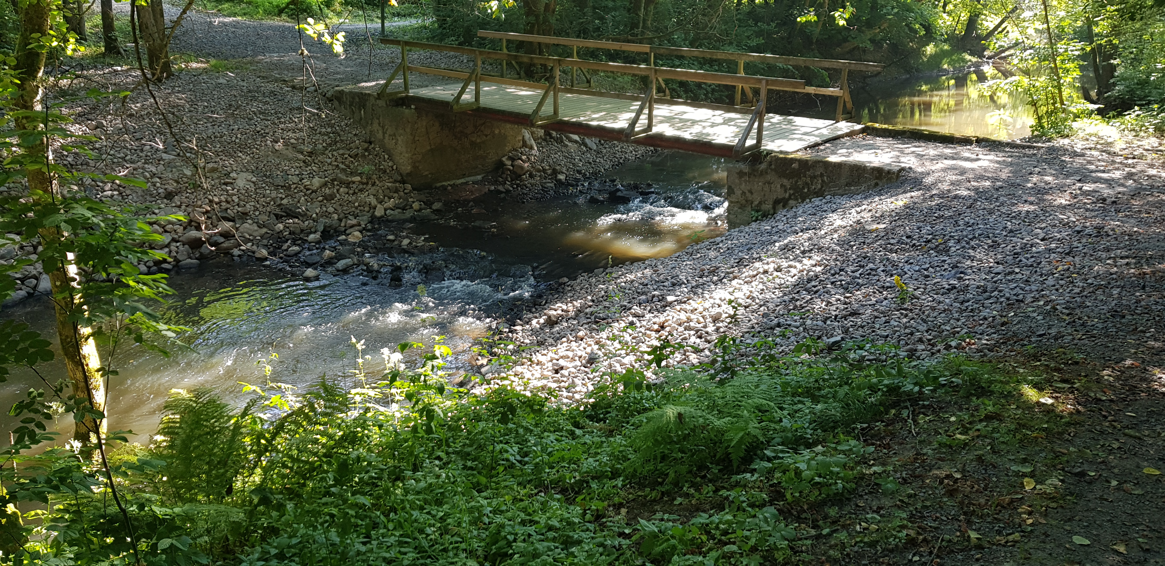 Lågvatten i Lärjeån, under torkan sommaren 2018